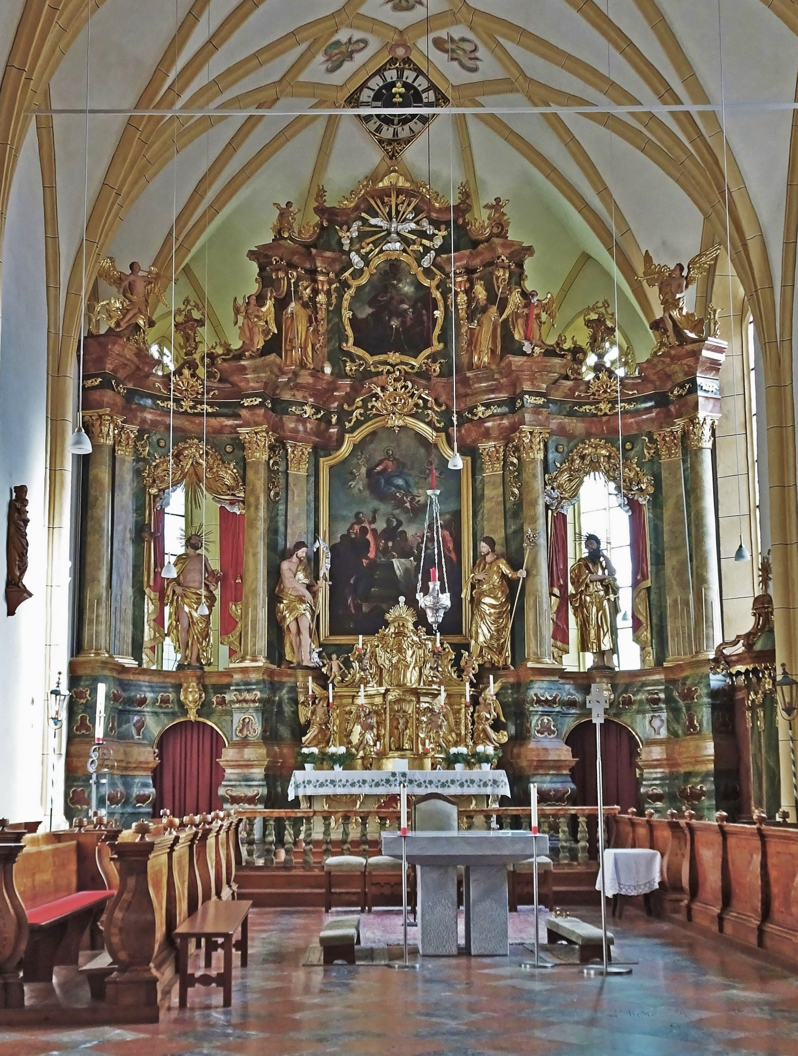 Kath. Pfarrkirche Hl. Martin (Obervellach). der Hochaltar